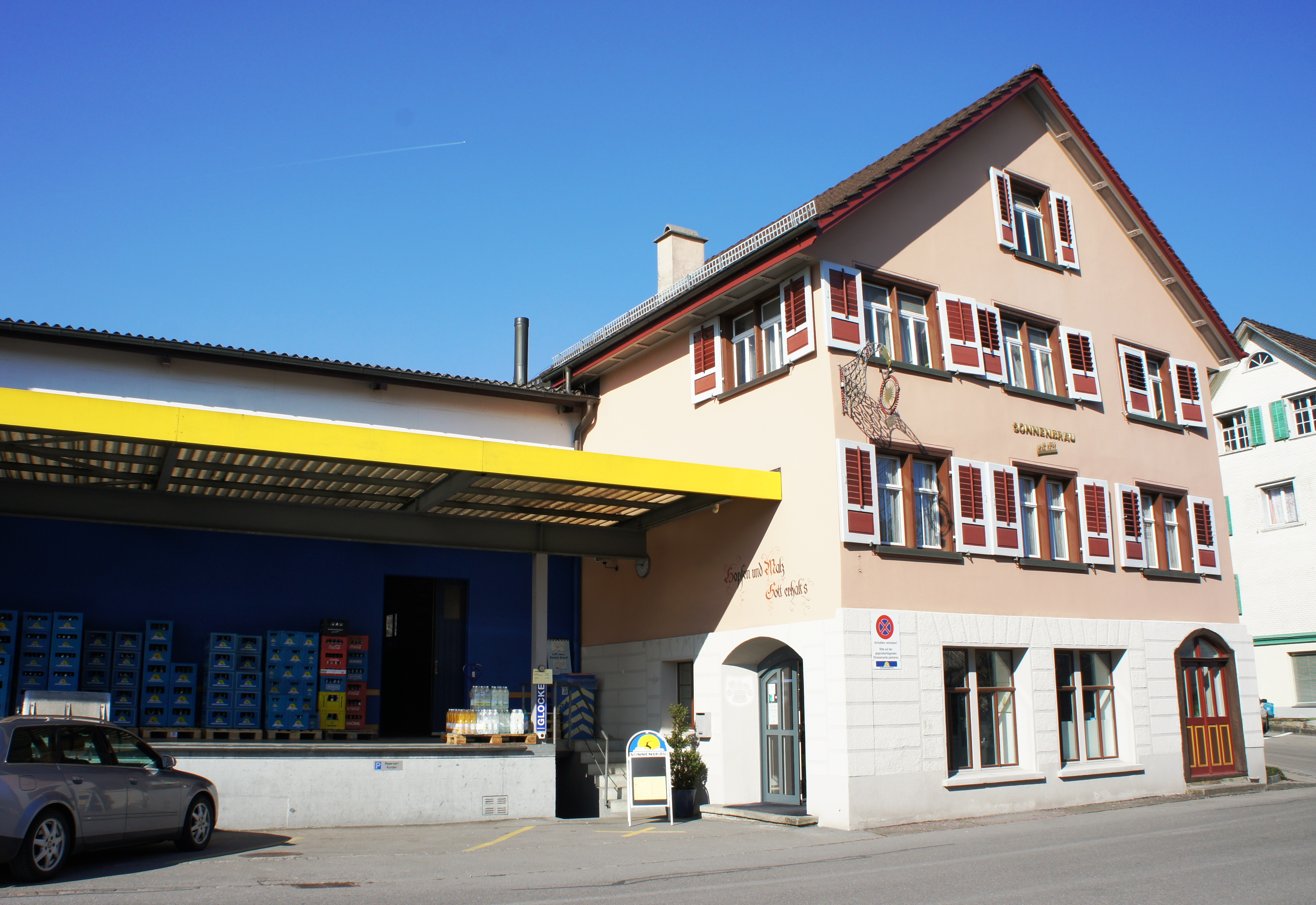 Ehemaliges Restaurant Sonne in Rebstein. Heute Verwaltung der Sonnenbräu. Links daran angebaut die Brauerei mit der Rampe für den Direkt-Verkauf.